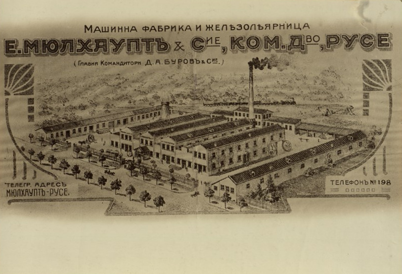 Машинна фабрика и железолеярница, командитно дружество Е. Мюлхауп & С-ие в Русе. Фотоалбум с фотографии на български индустриални предприятия от периода 1887-1912 г., подарен от Съюза на българските индустриалци на цар Фердинанд І по случай 25-годишнината от възшествието му на българския престол.